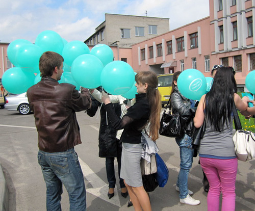 Активисты кампании «Говори Правду!» 3 мая в Бресте поделились со студентами и преподавателями шариками, закладками и буклетами с символикой кампании. 3.05.2010